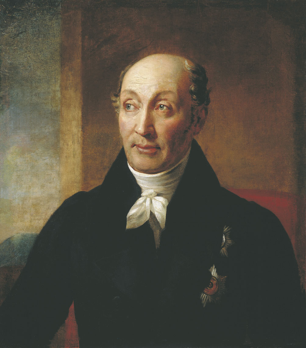 Портрет М. М. Сперанского, написанный Варнеком